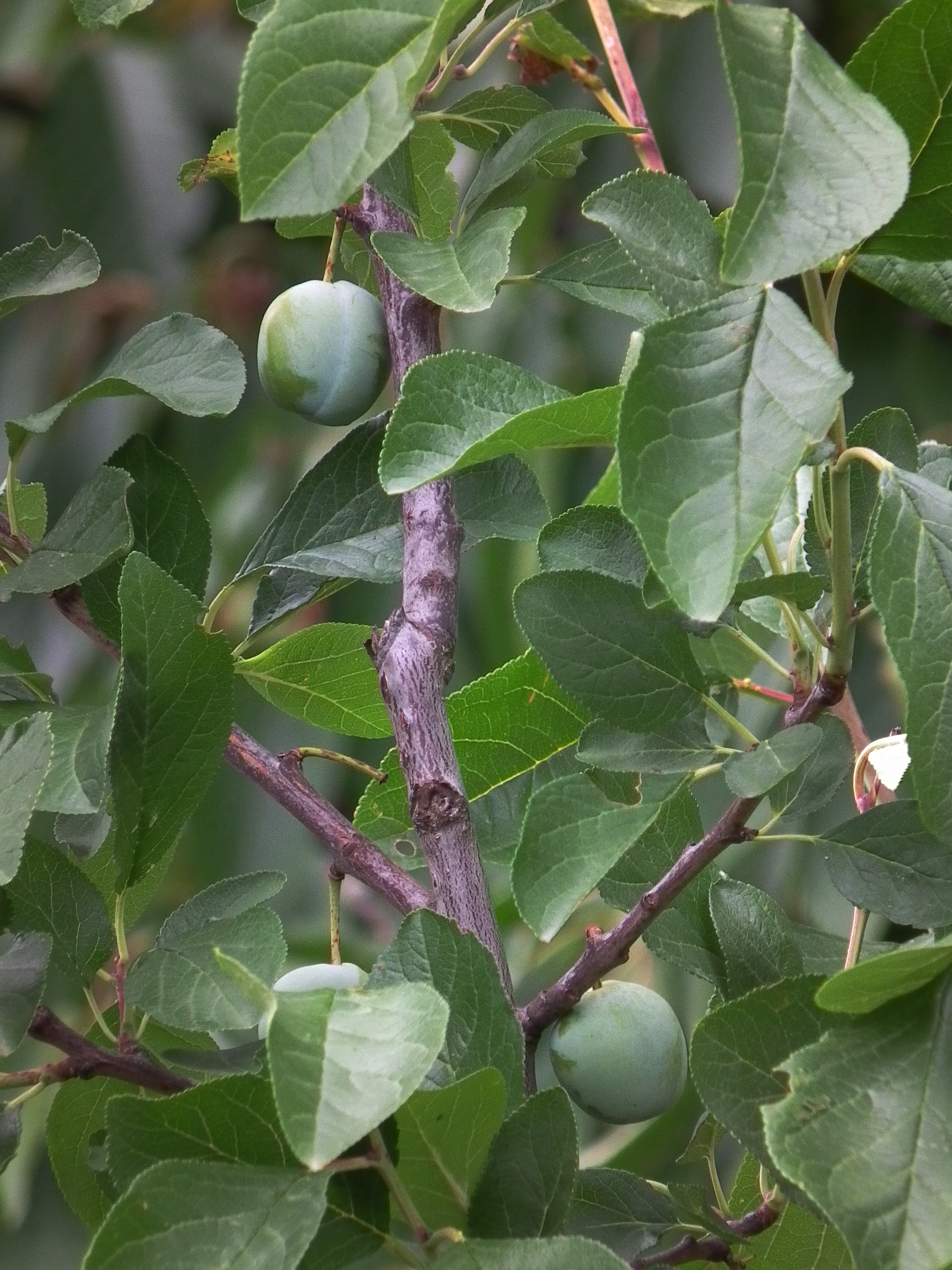 Unreife Edelpflaume "Graf Althans Reneklode" (Prunus domestica subsp. rotunda), fotografiert in Heidelberg (Baden-Württemberg, Deutschland)